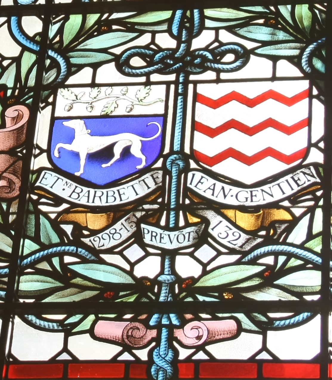 blason des Prévôts de Paris à l’hôtel de ville de Paris